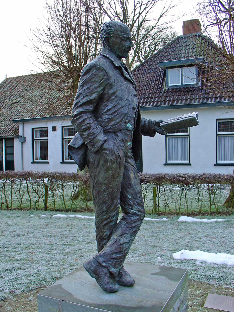 Hindericus Scheepstra (1859-1913) door Kiki Meyer - Roden (2002)